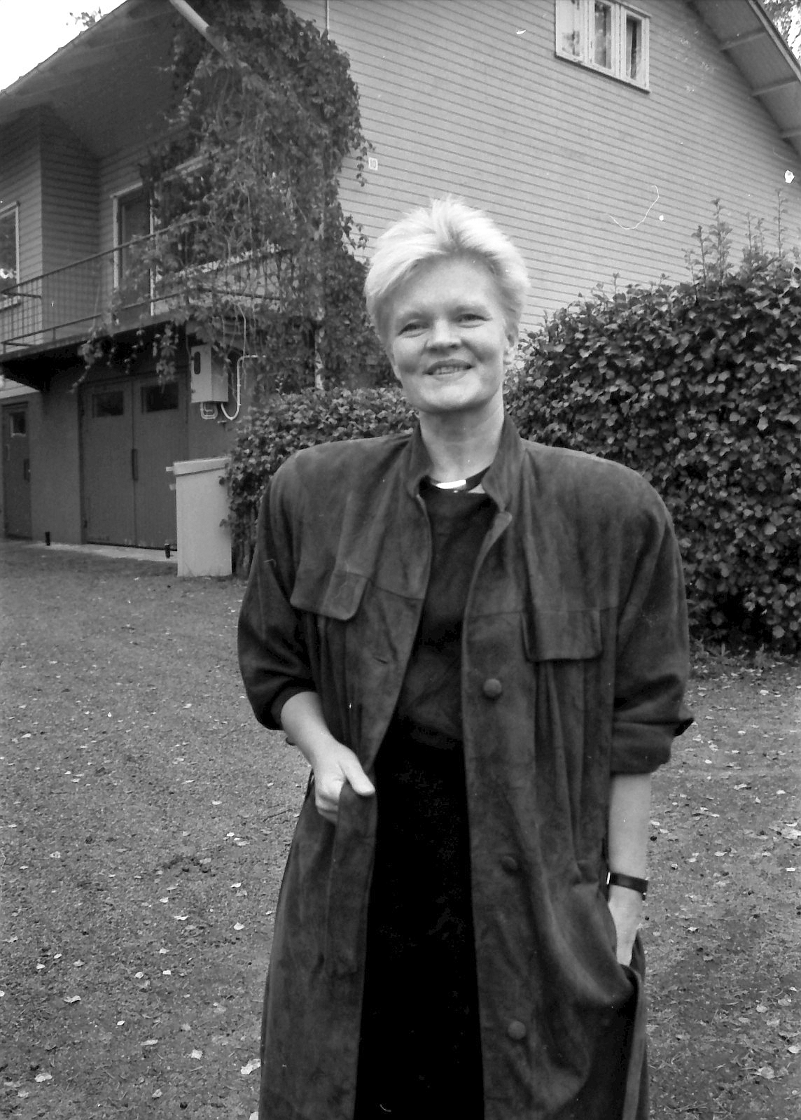 Anu Pentik lapsuudenkotinsa pihalla Kuusankoskella 27.9.1987